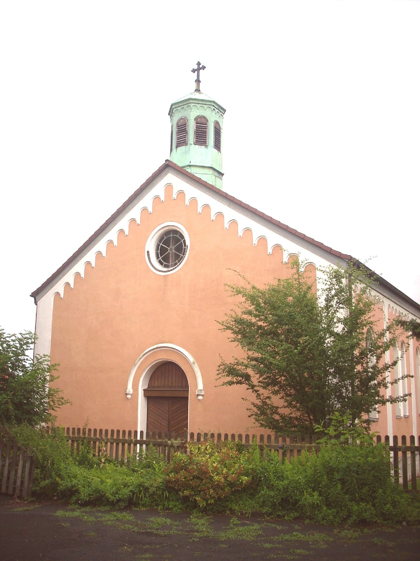 St. Mariä Himmelfahrt Westfeld von Westen